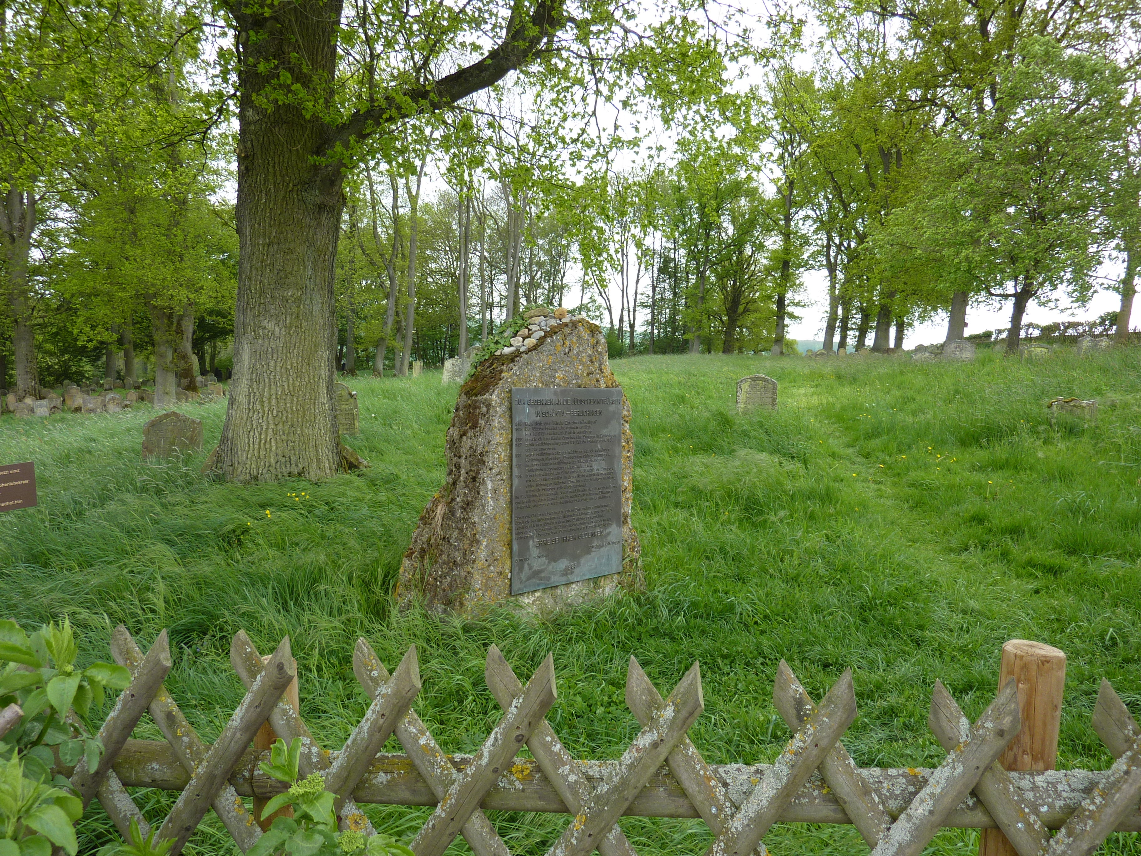 jüdischer Friedhof Berlichingen